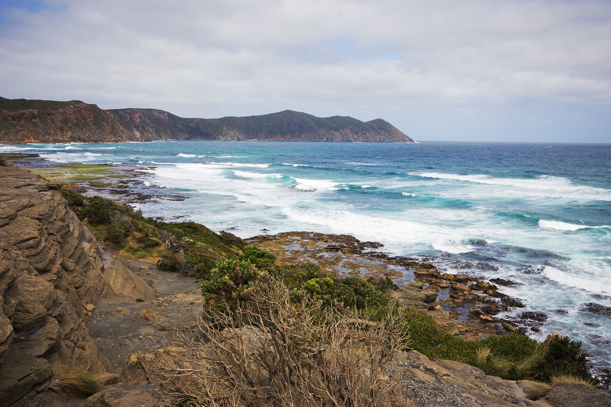 1.2 only